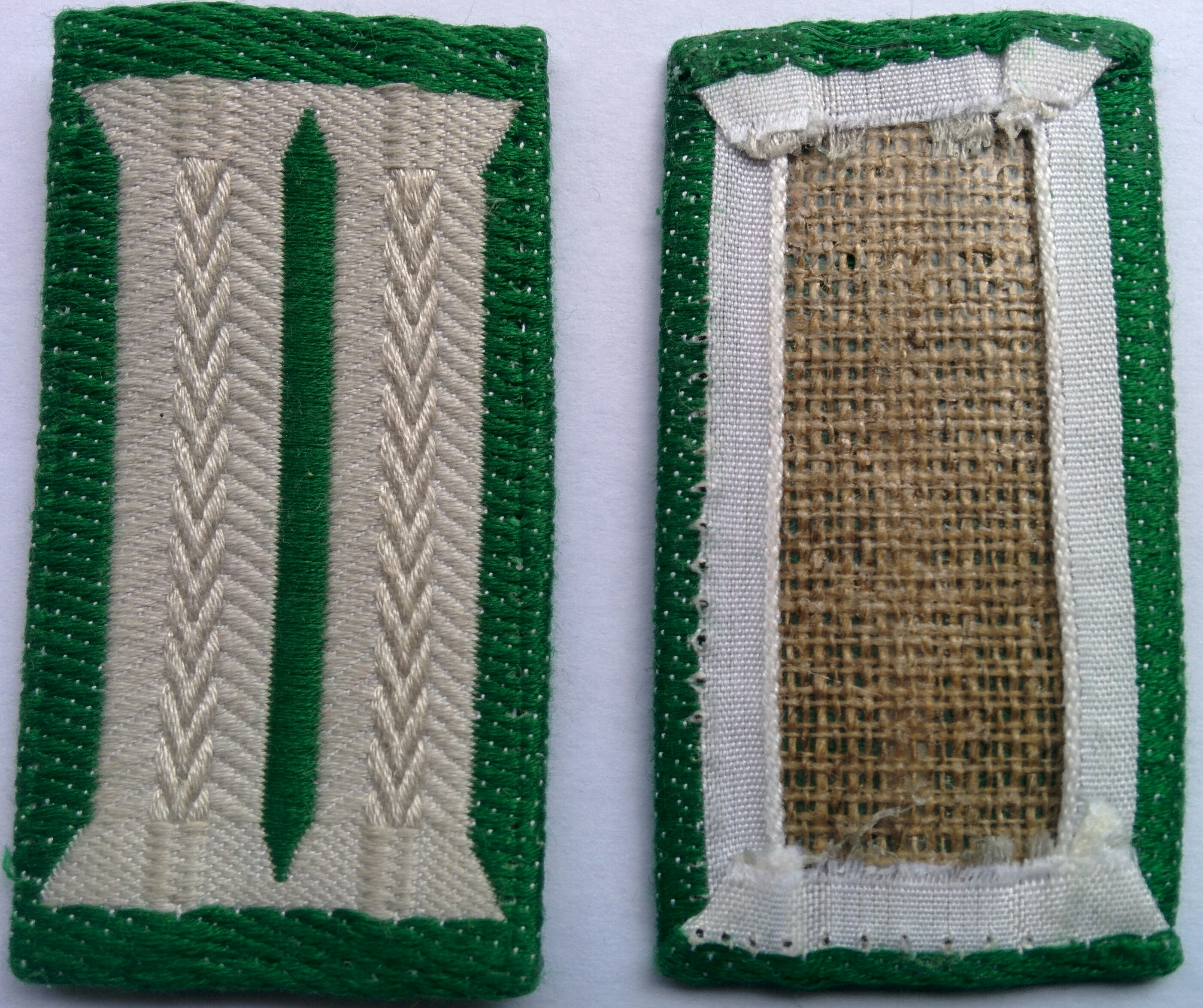 Kragenspiegel der Infanterie der Bundeswehr nach ZDv 37/10. Gewebte Version für Mannschaften und Unteroffiziere. Vorder und Rückseite. Für eine nähere Beschreibung → siehe auch hier.